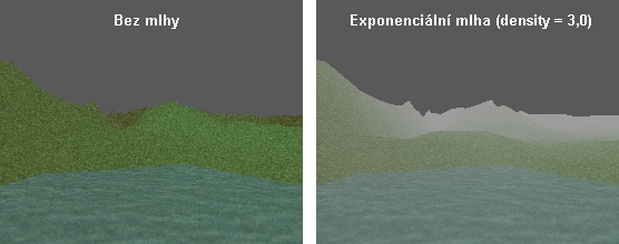 Porovnání scény s terénem renderované pomocí Direct3D bez mlhy a s mlhou.